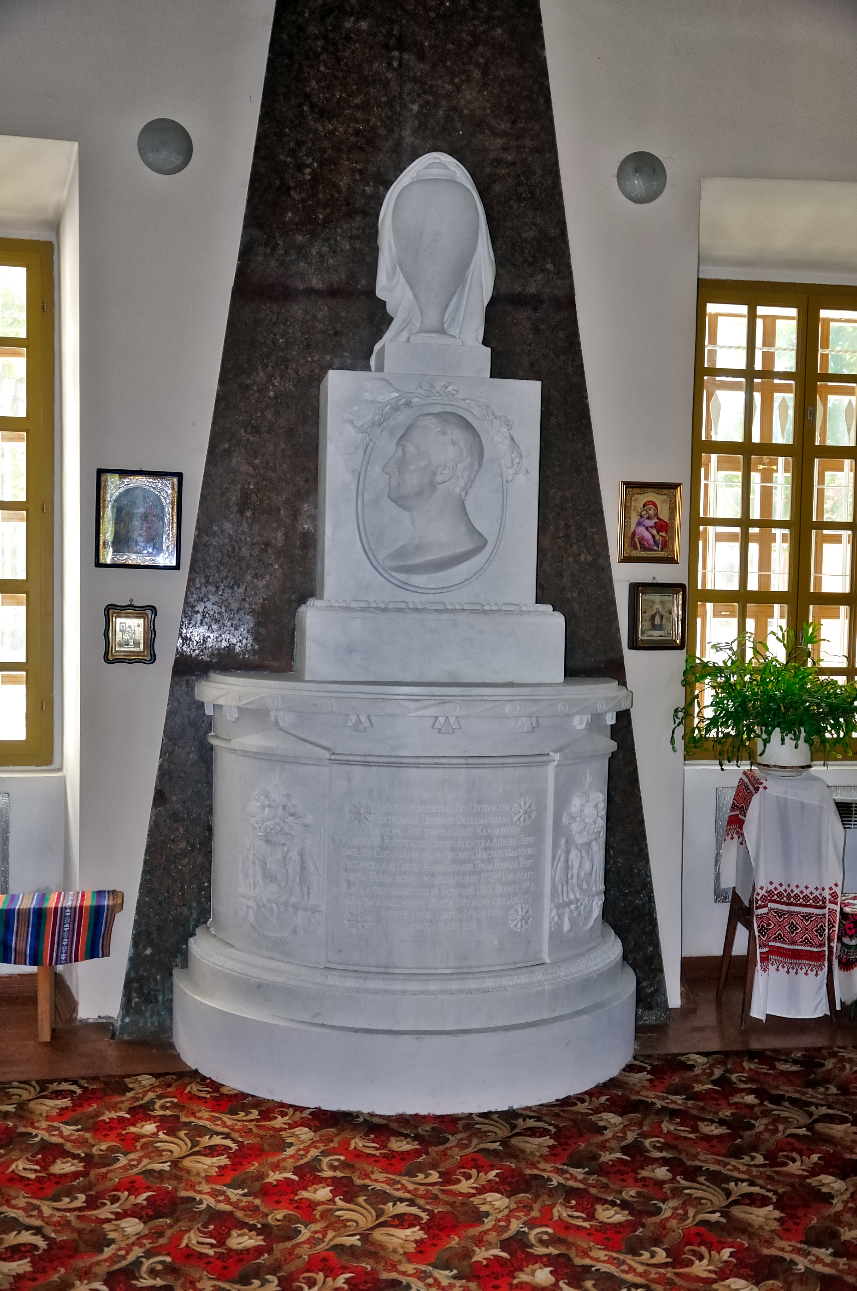 Місце поховання останнього українського гетьмана К.Г. Розумовського (1728-1803рр.) у Воскресенській церкві, Батурин, вул. Партизанська, 13